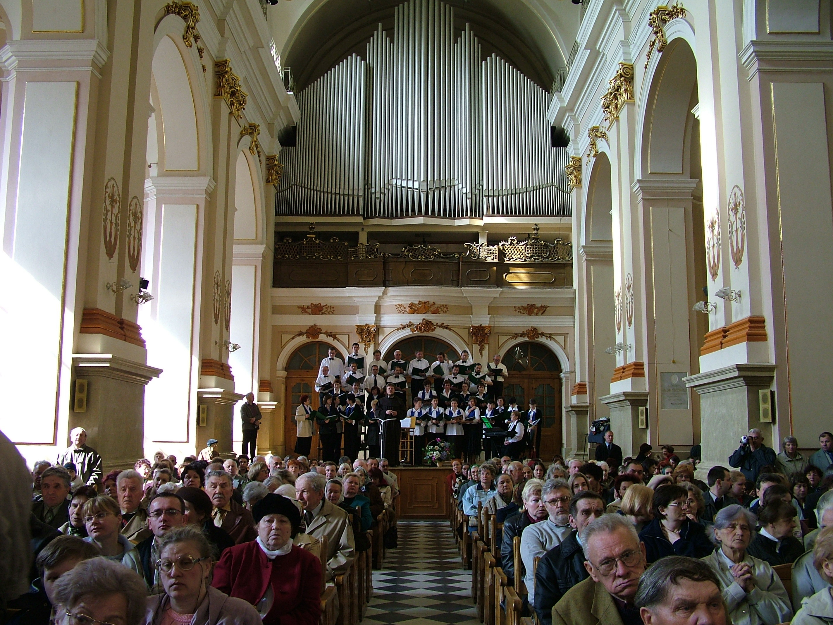 Kościół św. Marii Magdaleny we Lwowie. Widok nawy głównej w kierunku organów. 1 maja 2005.